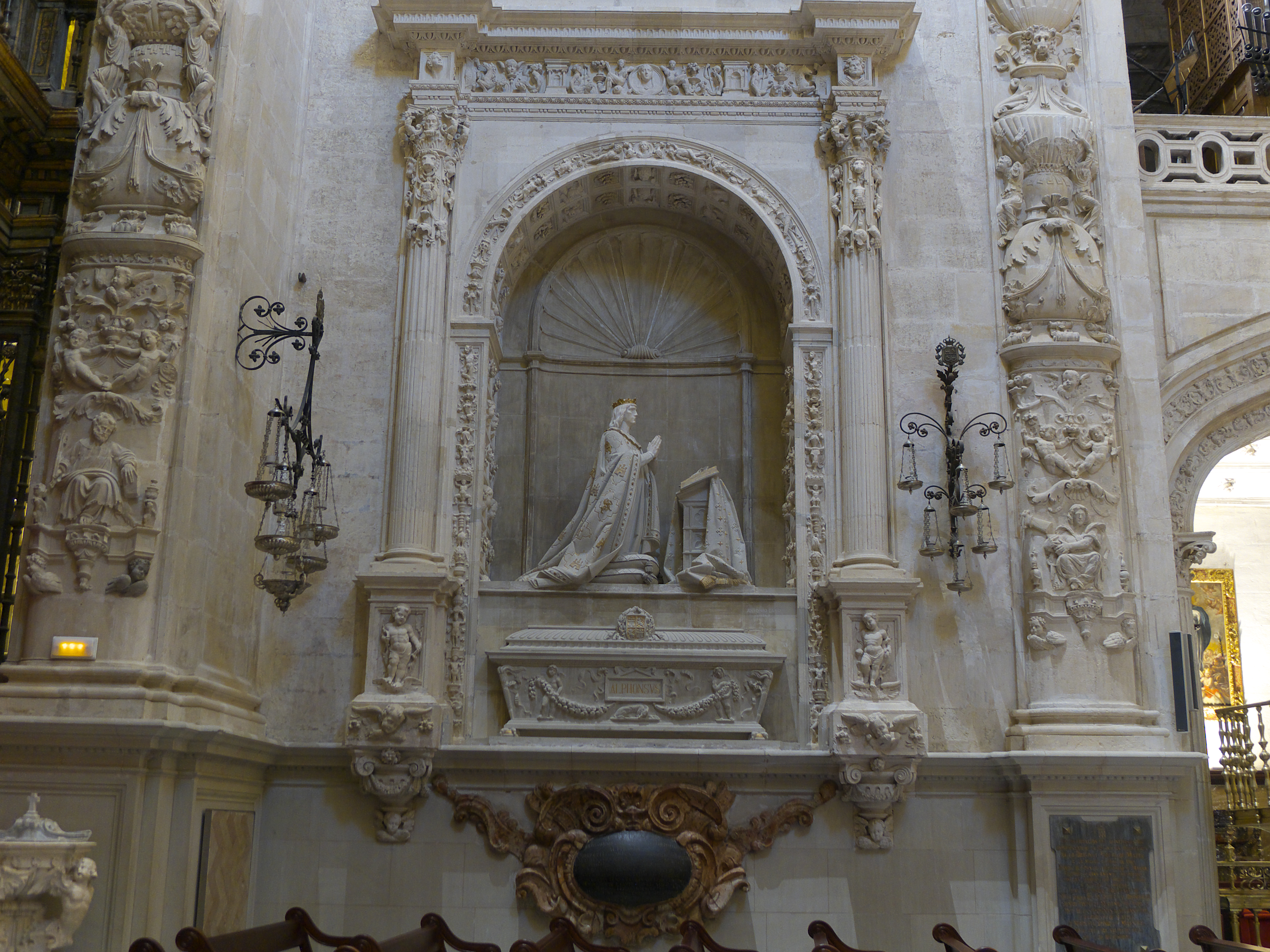 Sepulcro del rey Alfonso X de Castilla (1221-1284). Se encuentra en la capilla Real de la catedral de Sevilla.